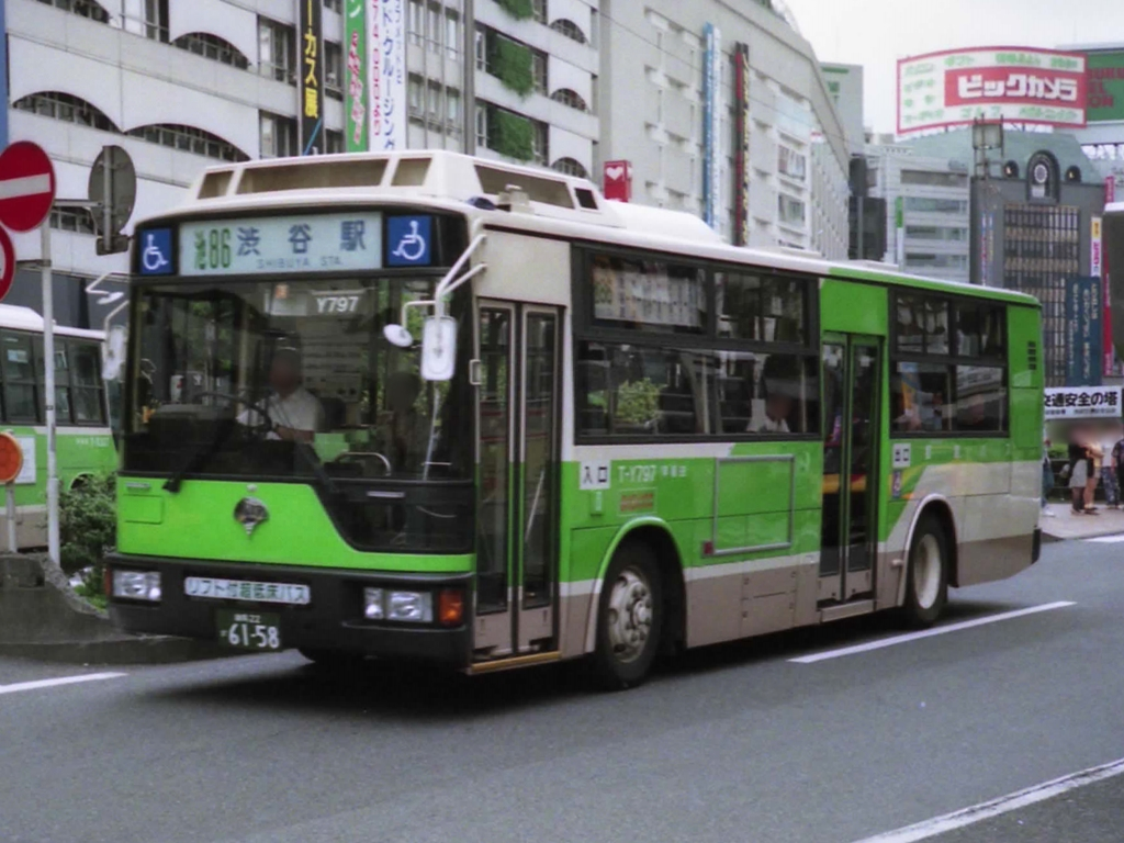 U-MP628K Toei T-Y797 リフト付超低床バス